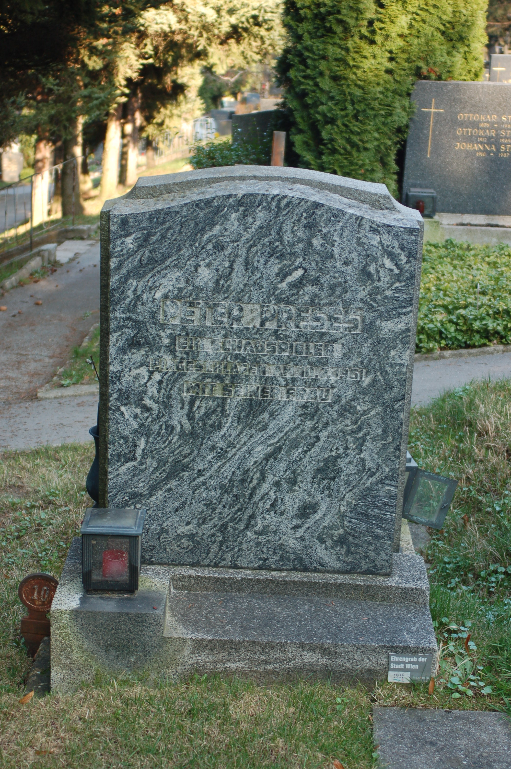 Neustifter Friedhof, Grabmal Hermann Peter Preses (Ehrengrab)